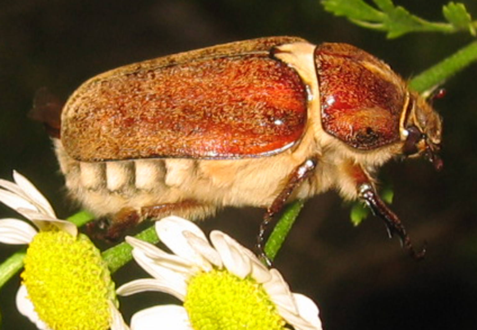 Anoxia villosa; Melolonthidae; Maikäferartige